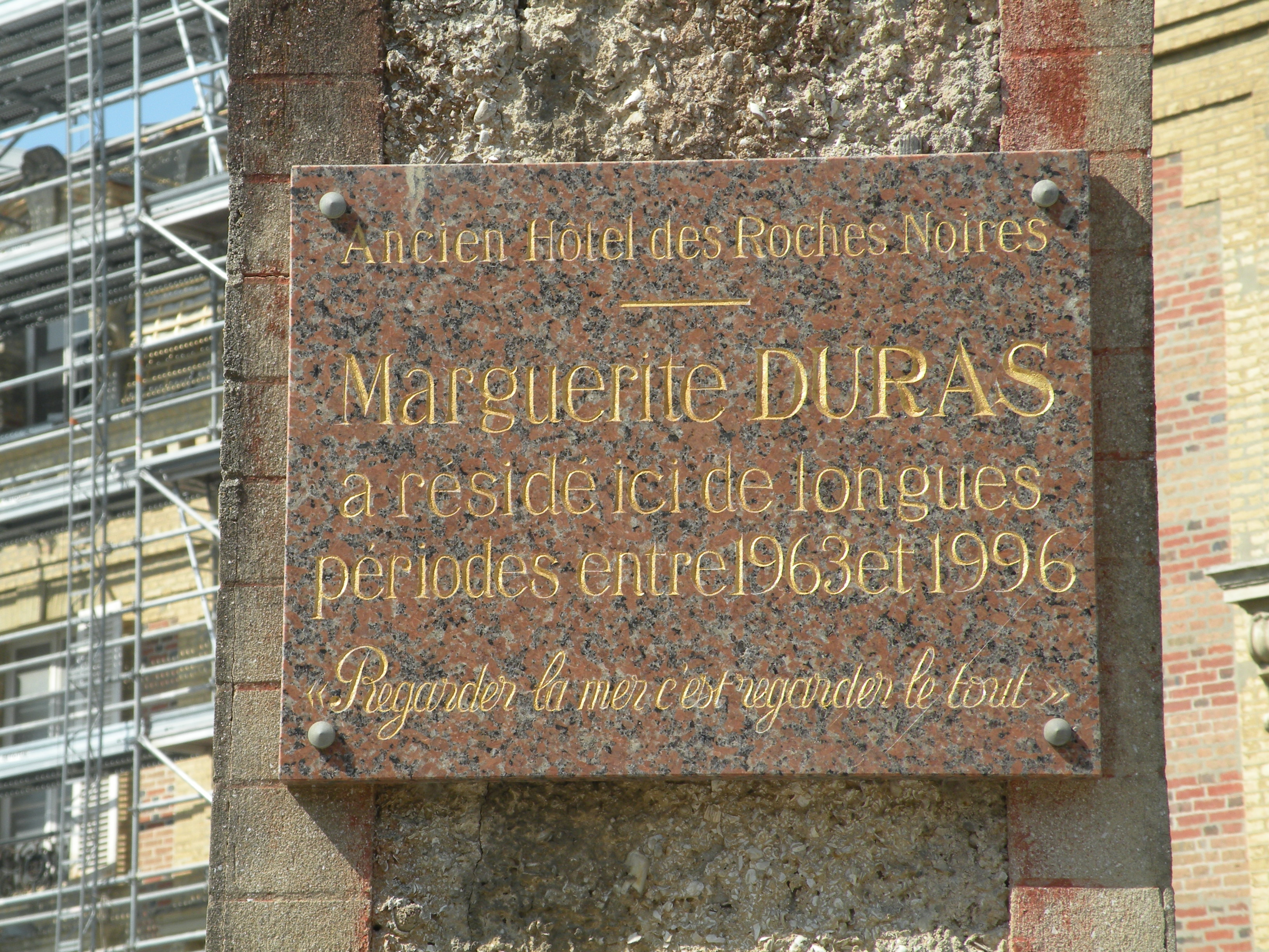 Plaque rendant hommage à Marguerite Duras sur l'hôtel des Roches Noires à Trouville-sur-Mer ; elle y a résidé entre 1963 et 1996.